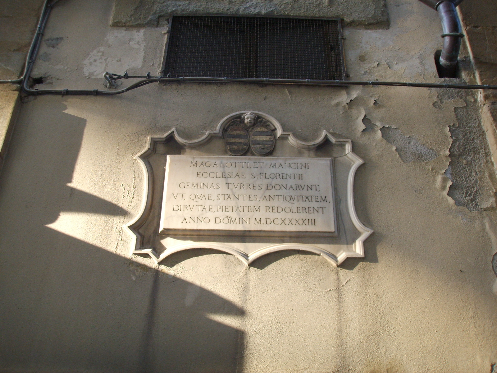 Borgo dei greci, targa magalotti-mancini